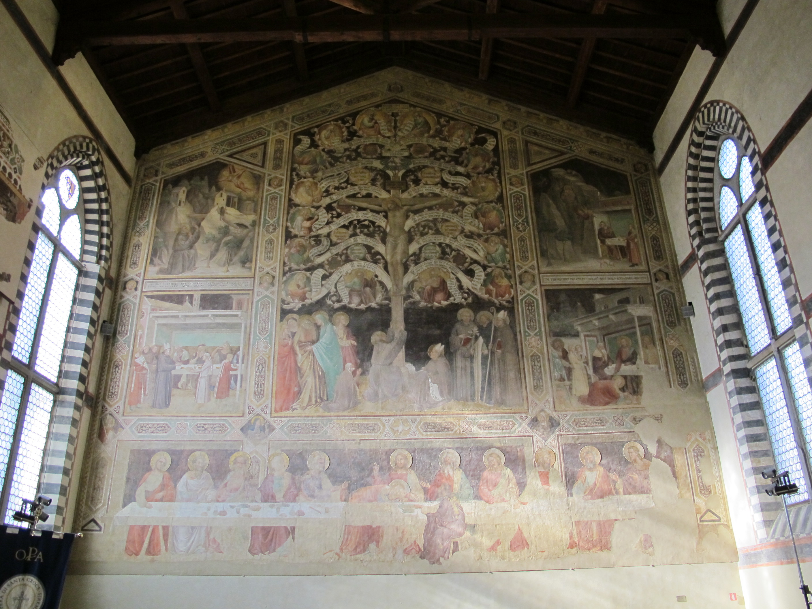 Museo di santa croce, refettorio